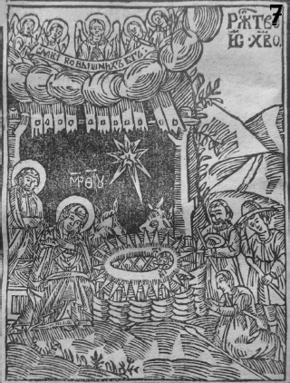 Нараджэнне Хрыстова. Дрэварыт з кнігі "Трыфалагіён" (Куцейна: друкарня манастыра, 1647)